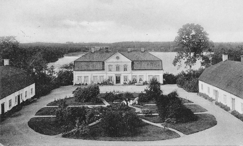 Gården Edeby, Helgarö socken